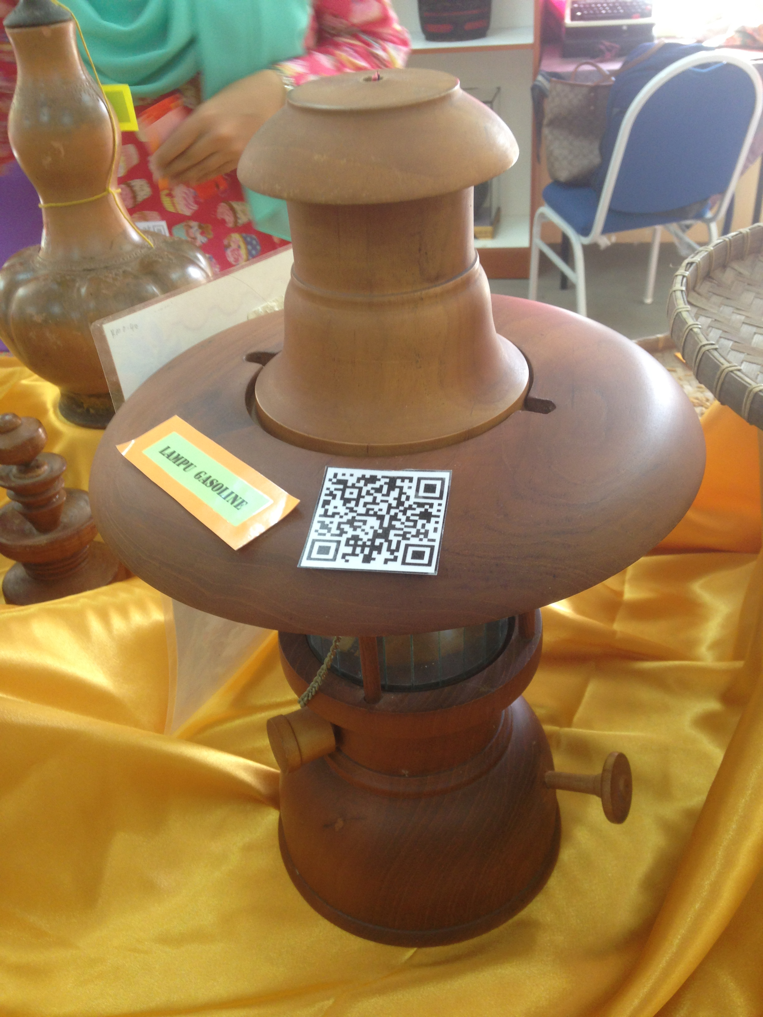 LAMPU GASOLIN